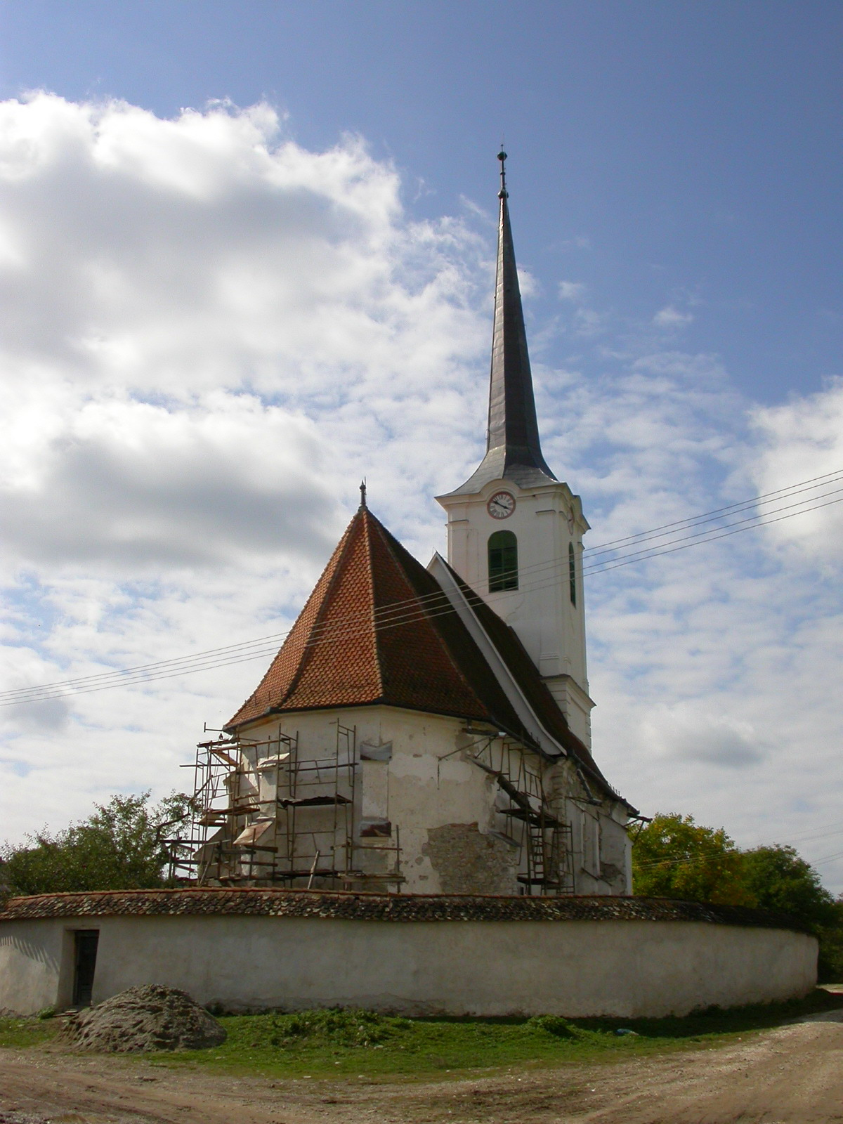 Ansamblul bisericii reformate, sec. XIV - XVIII